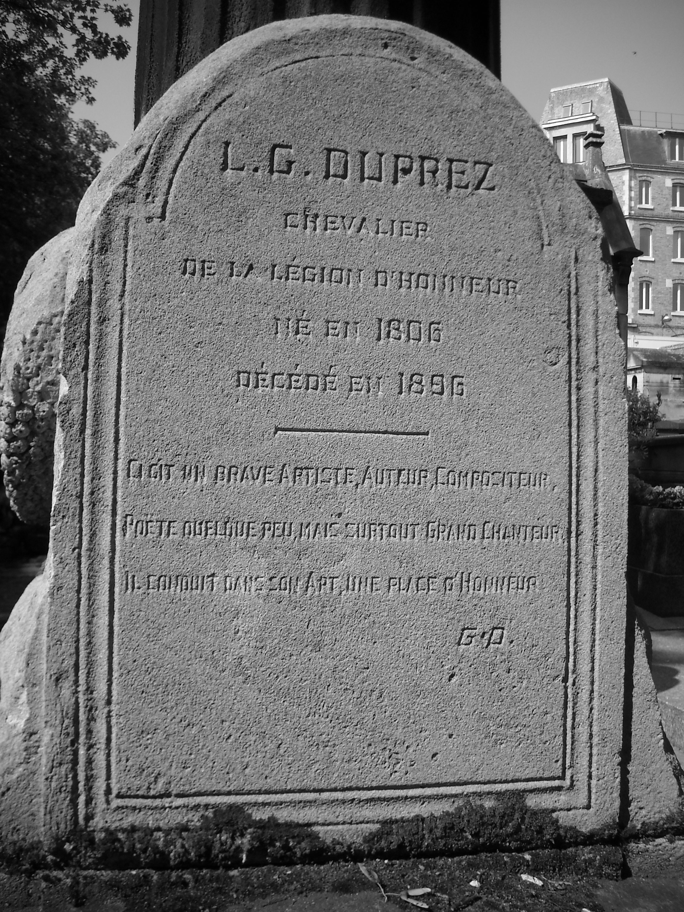 épitaphe de Gilbert Duprez sur sa tombe au cimetière de Montmartre (12ème division)